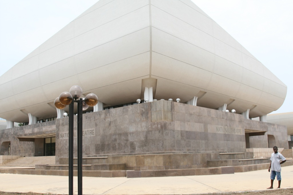 Théâtre national du Ghana à Accra, au Ghana.